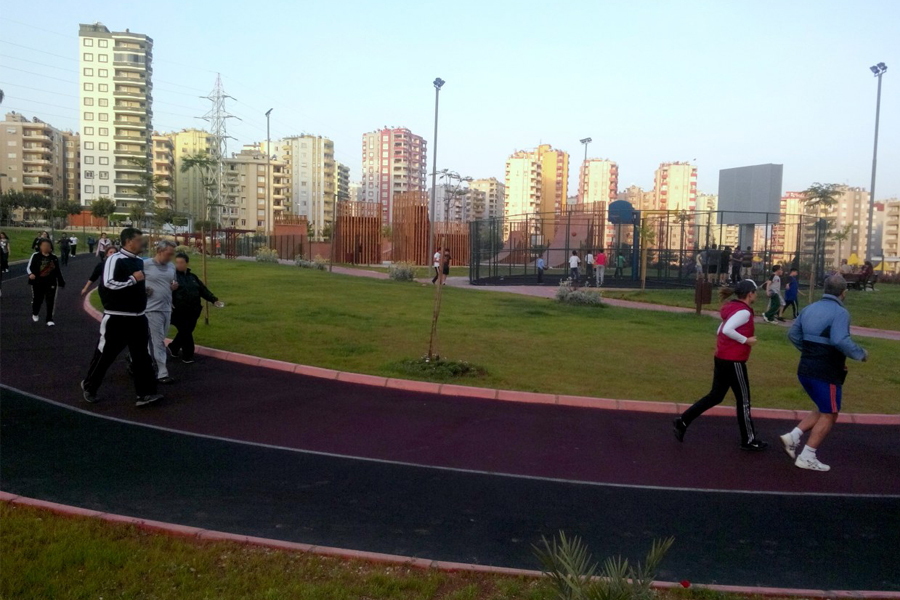 Adana BŞB Spor Parkı'ndan bir görünüm.